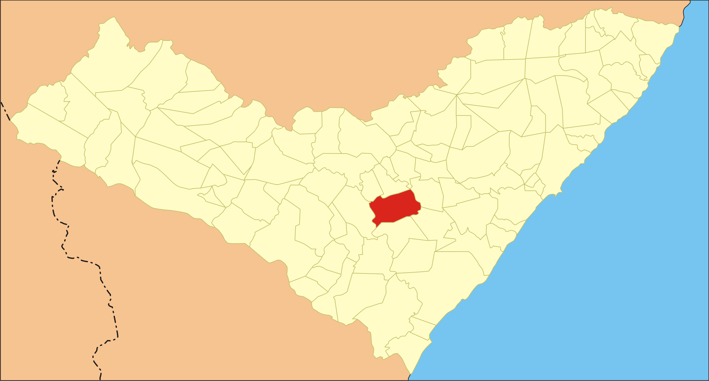 Localização da cidade no estado de Alagoas.